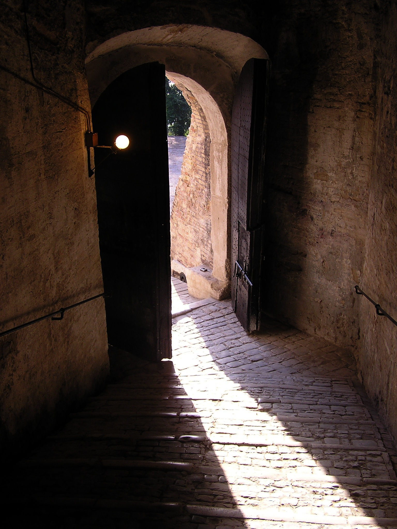 Galleria di ingresso alla Cittadella di Ancona, (opera militare del 1532 di Antonio da Sangallo il Giovane) scattata nel giorno dell'inaugurazione seguita al restauro eseguito a cura della Soprintendenza ai Beni Ambientali ed Architettonici delle Marche.